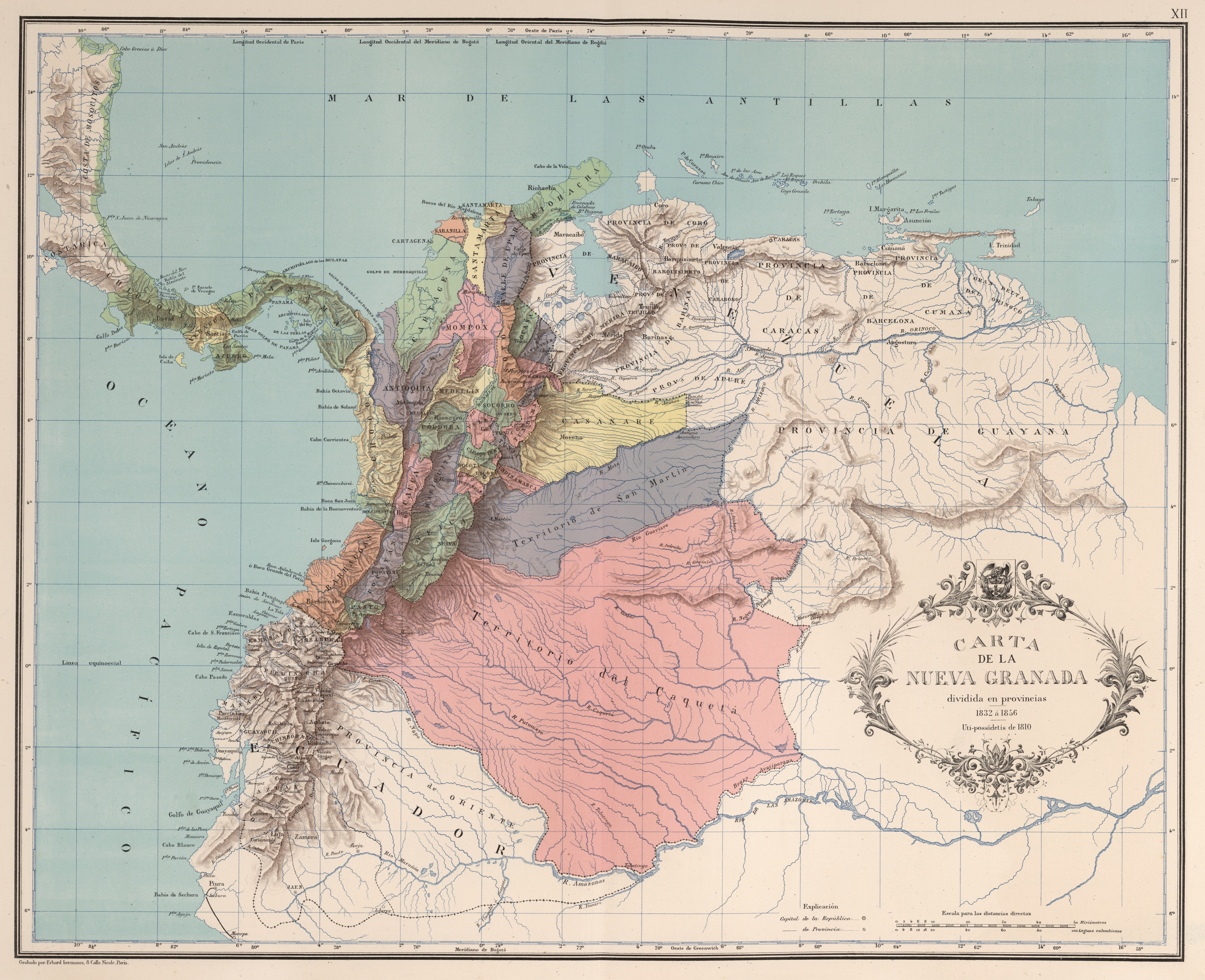 Carta de la Nueva Granada dividida en provincias entre 1832 y 1855. Carta XII del Atlas geográfico e histórico de la República de Colombia, 1890.